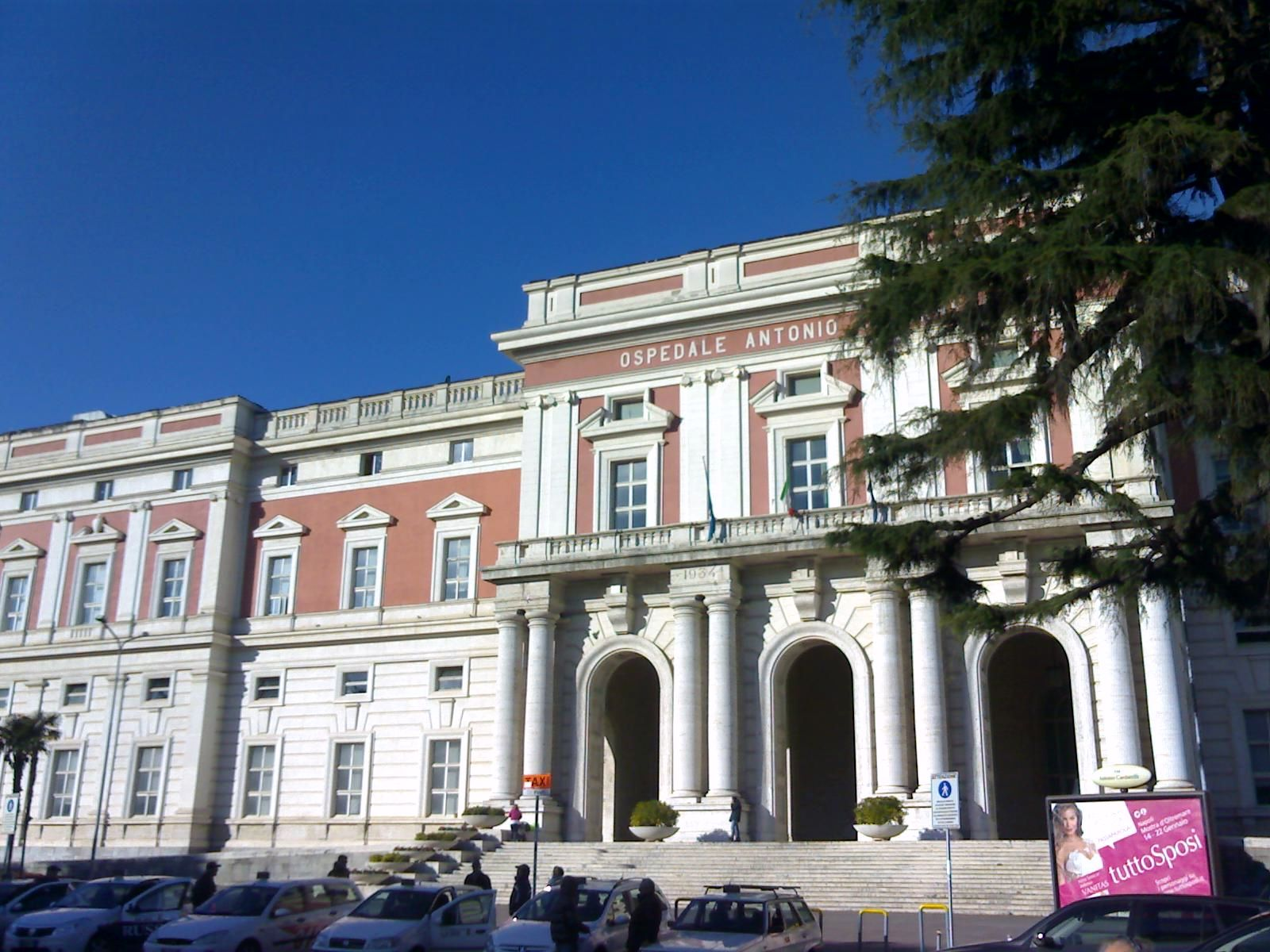 Parte della facciata dell'ospedale Cardarelli (Napoli)